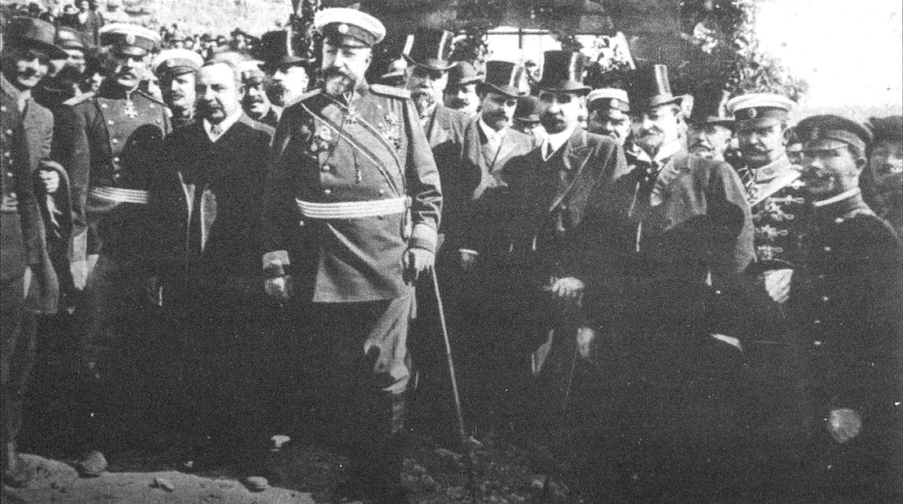 Цар Фердинанд, министър-председателят Александър Малинов, членове на правителството и генерали при обявяването на независимостта на България, Търново, 5 октомври 1908 г.